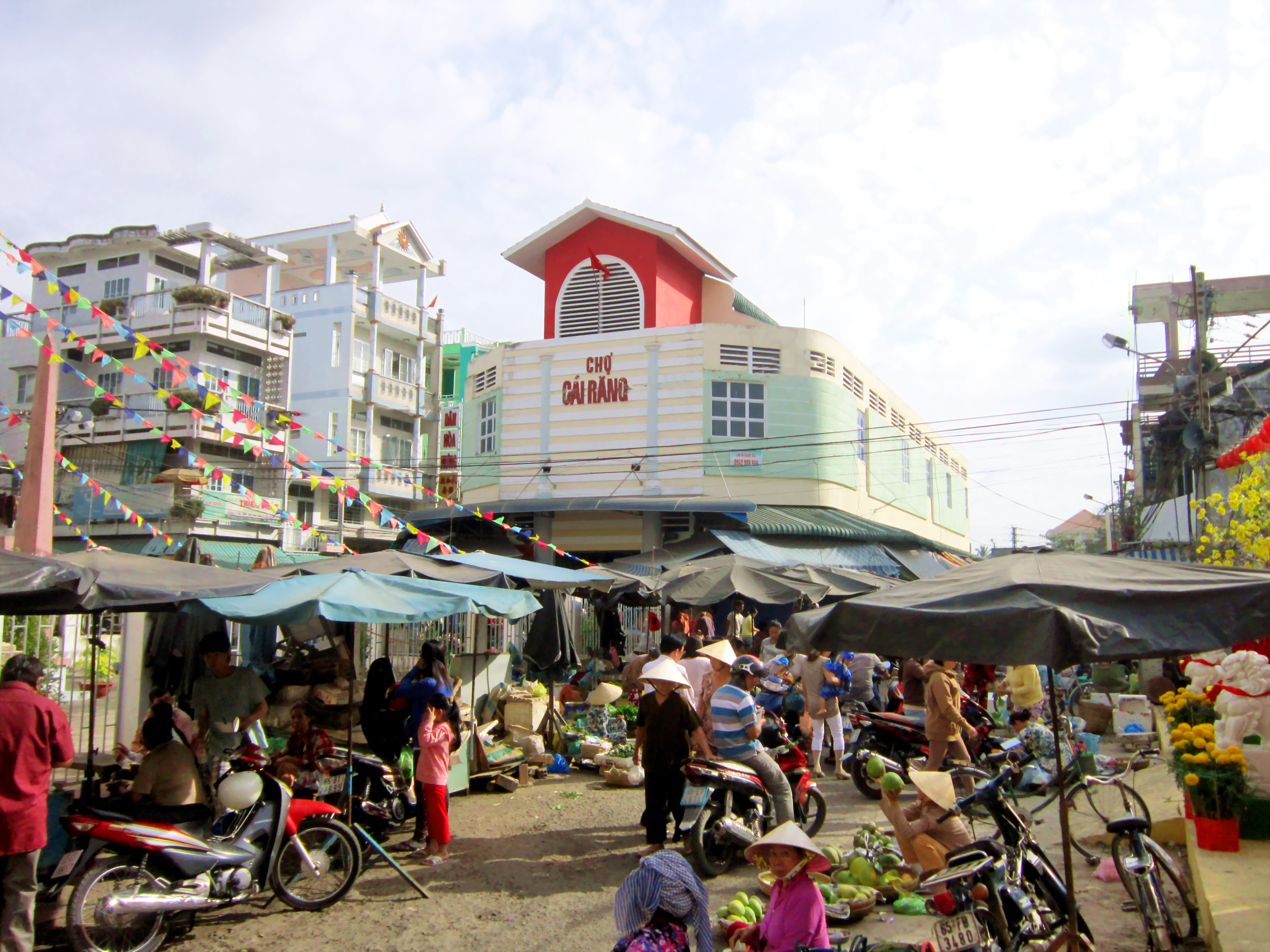 Chợ Cái Răng nằm trên địa bàn phường Lê Bình, quận Cái Răng, Cần Thơ, Việt Nam.